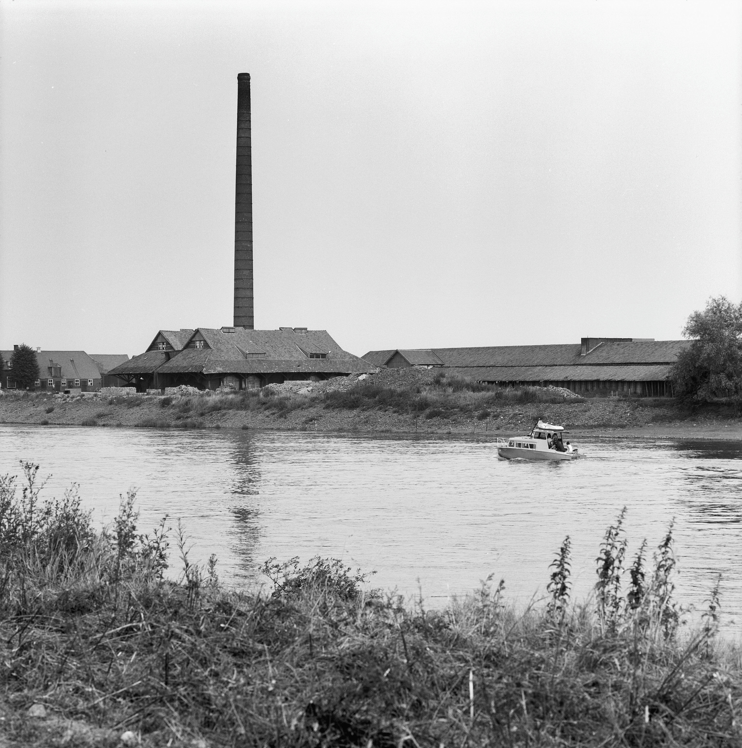 Steenfabriek "Randwijk": overzicht, Veerweg 5